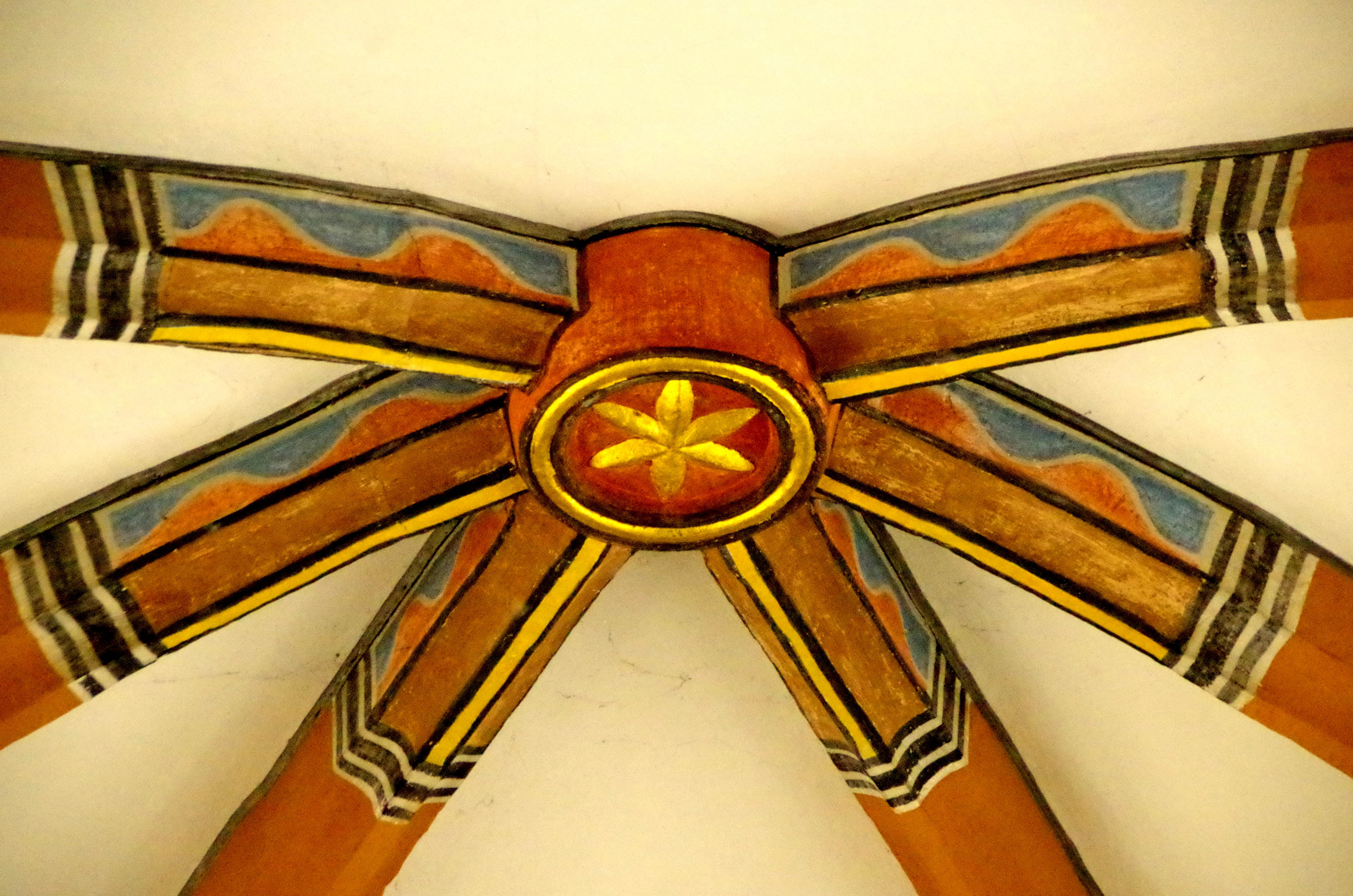 St. Peter (Zingsheim), Schlussstein im Chor